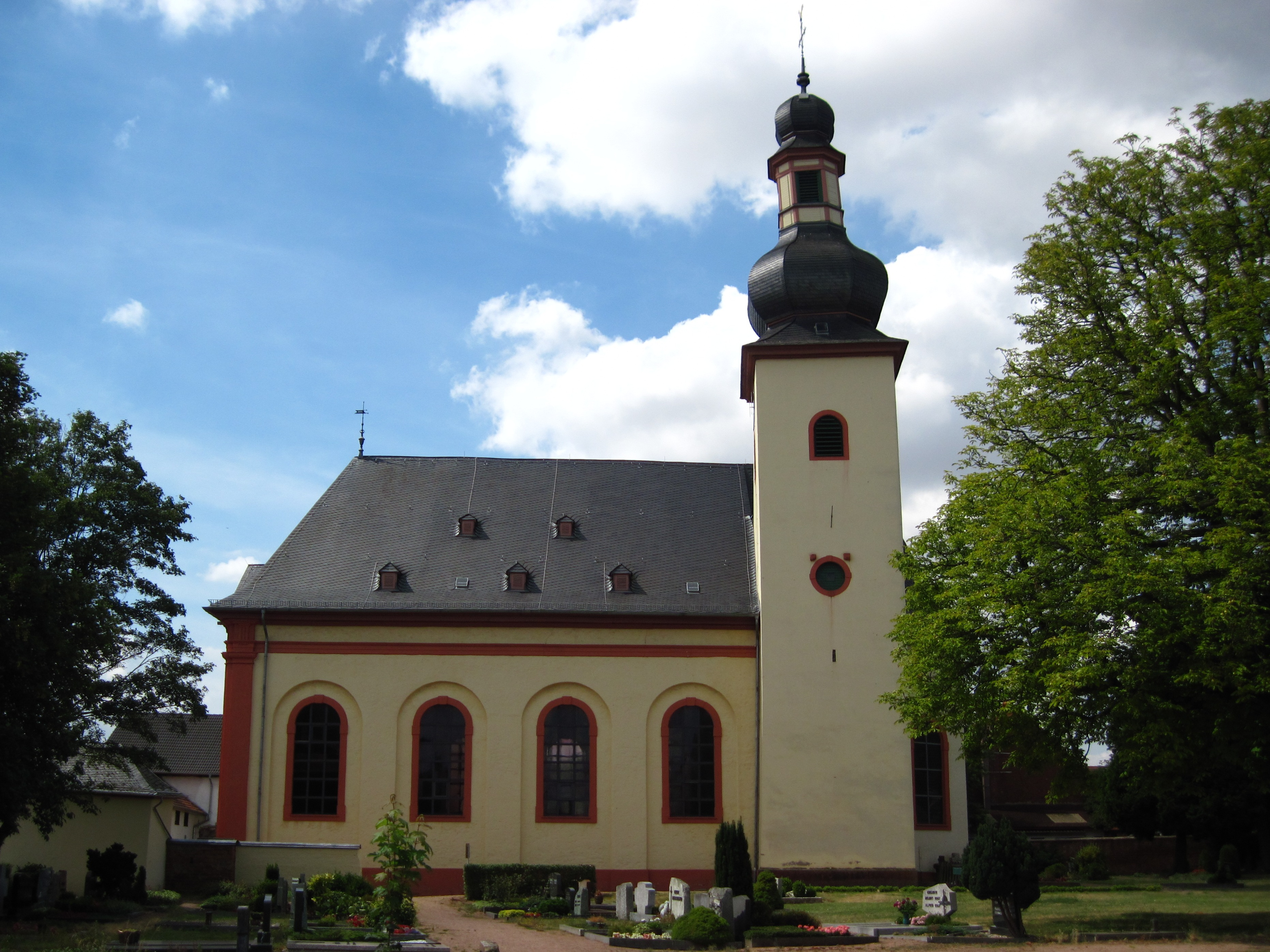 Katholische Pfarrkirche Mariä Geburt in Bretzenheim, Kirchstraße 20: frühklassizistischer Saalbau, 1789–91, Bauinspektor Johann Faxlunger, Mannheim, mittelalterlicher Turm mit barockem Helm. Ansicht von Nordosten.